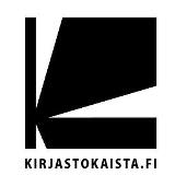 Kirjastokaista logo